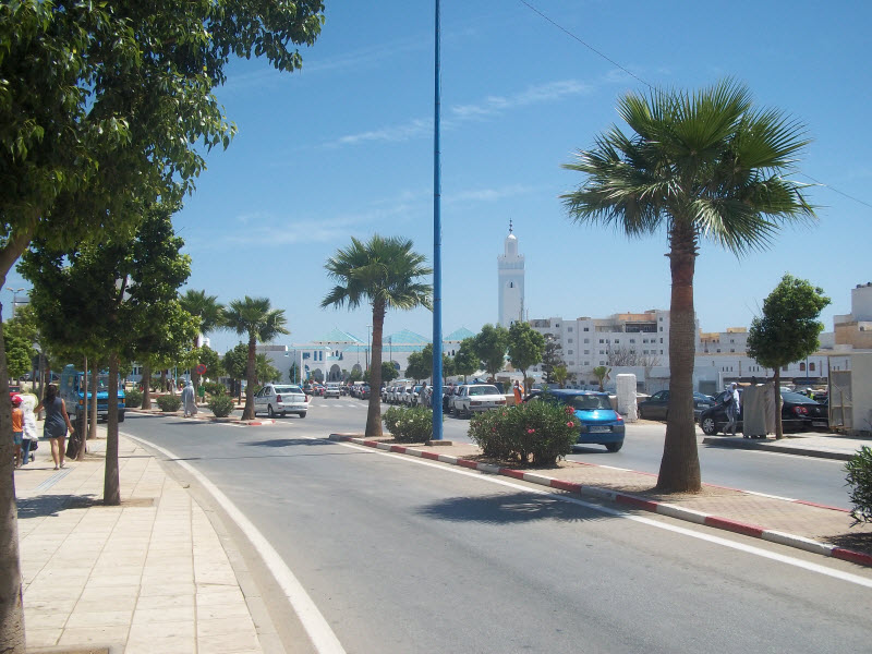 Mezquita de Castillejos (Finideq), en Marruecos